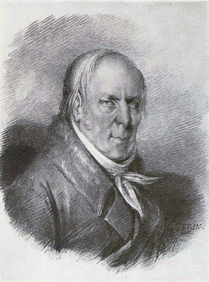 Гудович Иван Васильевич (1741-1820)